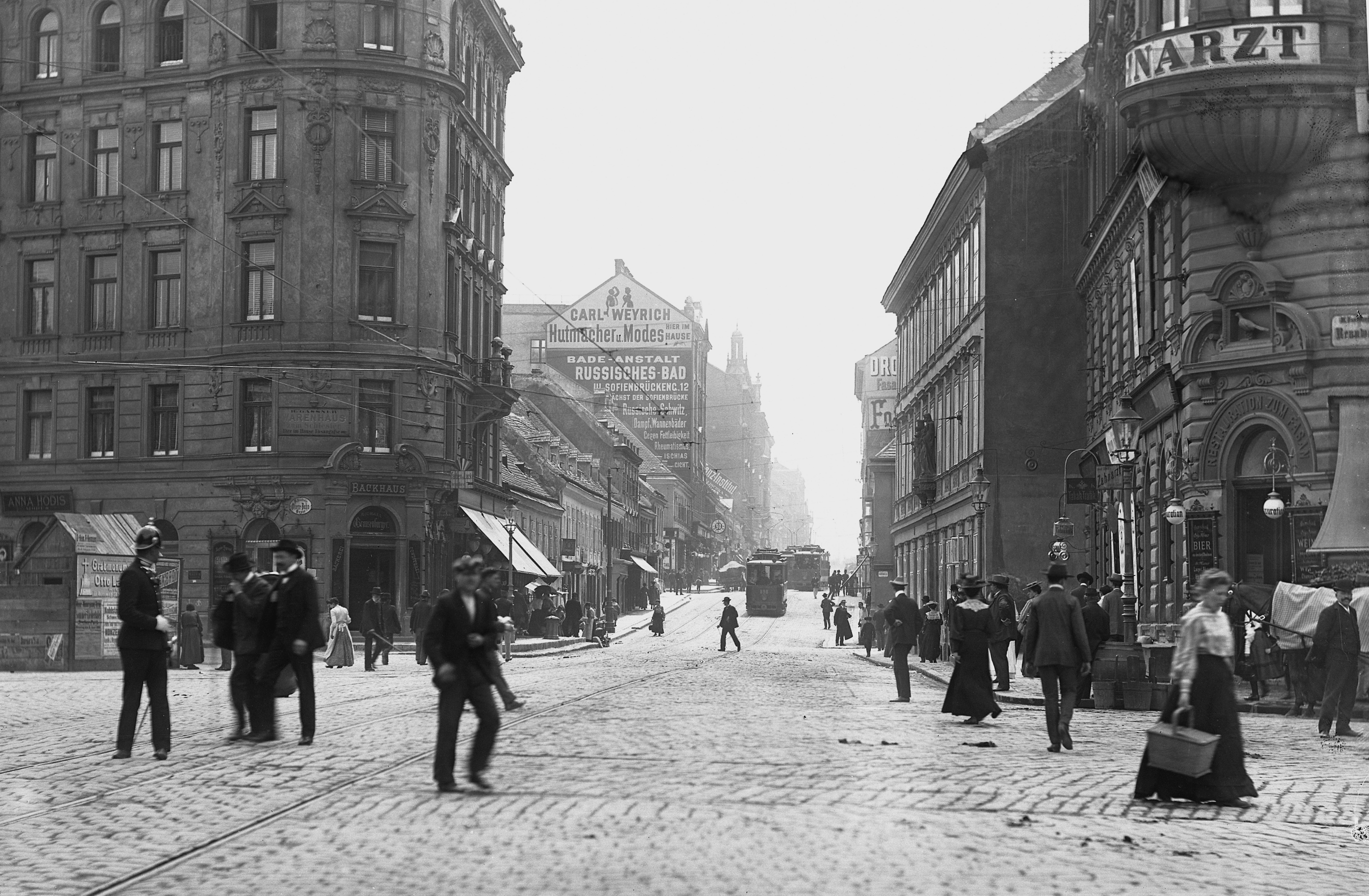 Kruciĝo de Fasangasse kaj Rennweg en Vieno